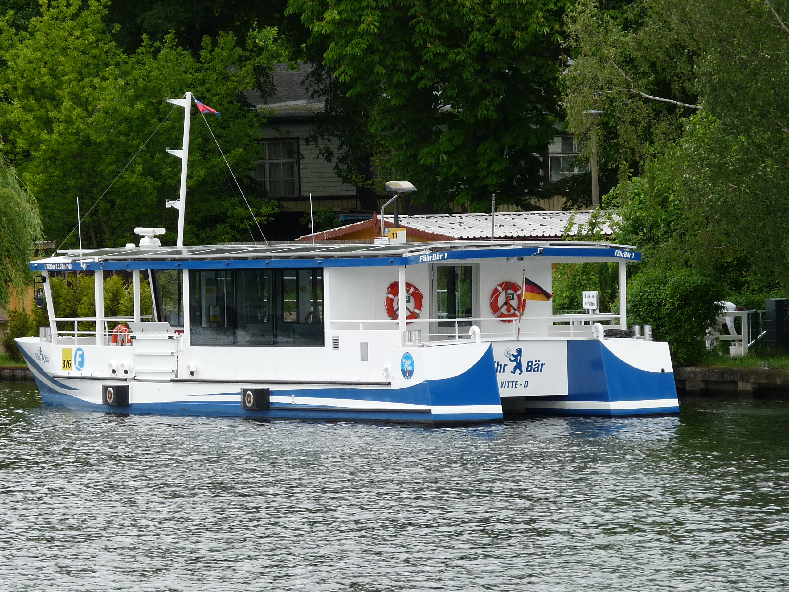 Die Elektrofähre Fähr-Bär 1 der Linie F 11 in Berlin.